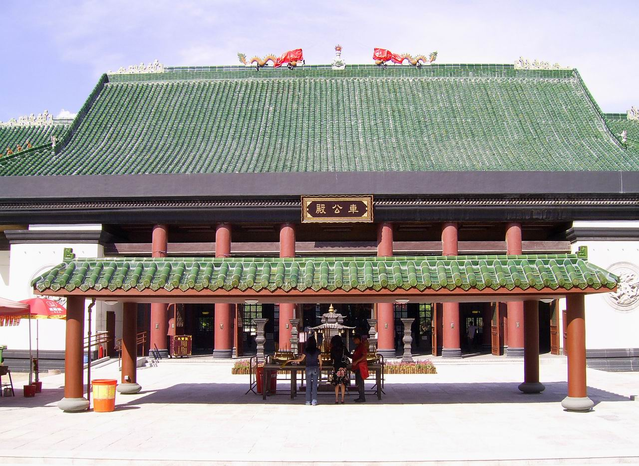 中文（香港）: 沙田車公廟